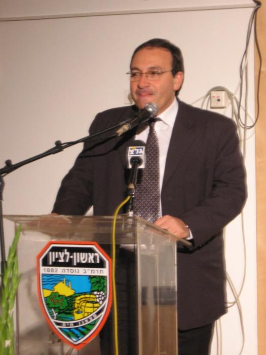 ערב פתיחת התערוכה "כשהכריש והדג נפגשו לראשונה" על פי ספרו של גלעד שליט בספרייה "כותר שקמה" בראשון-לציון. בתמונה: דב צור, ראש עיריית ראשון-לציון נושא דברים.